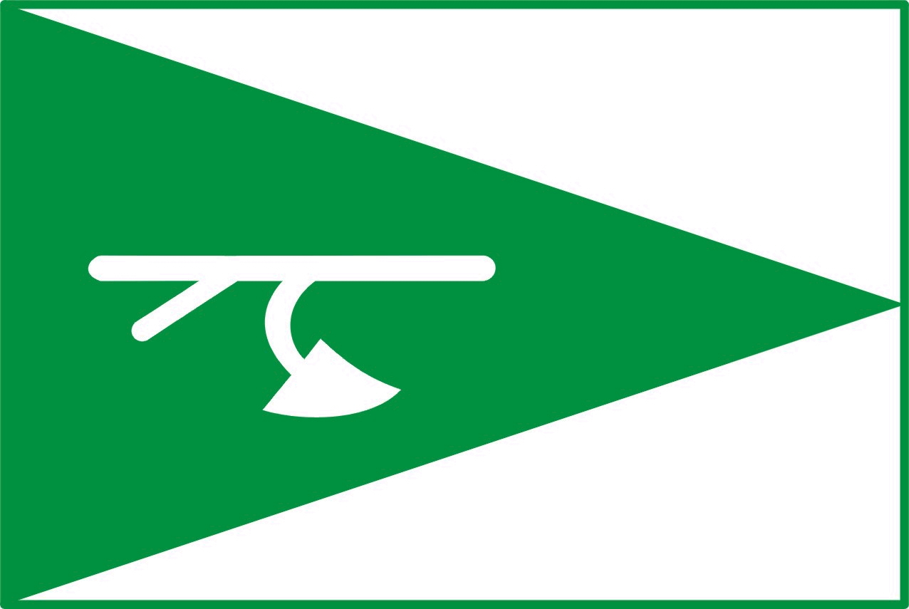 Vlag van Lichnov_(okres_Nový_Jičín)